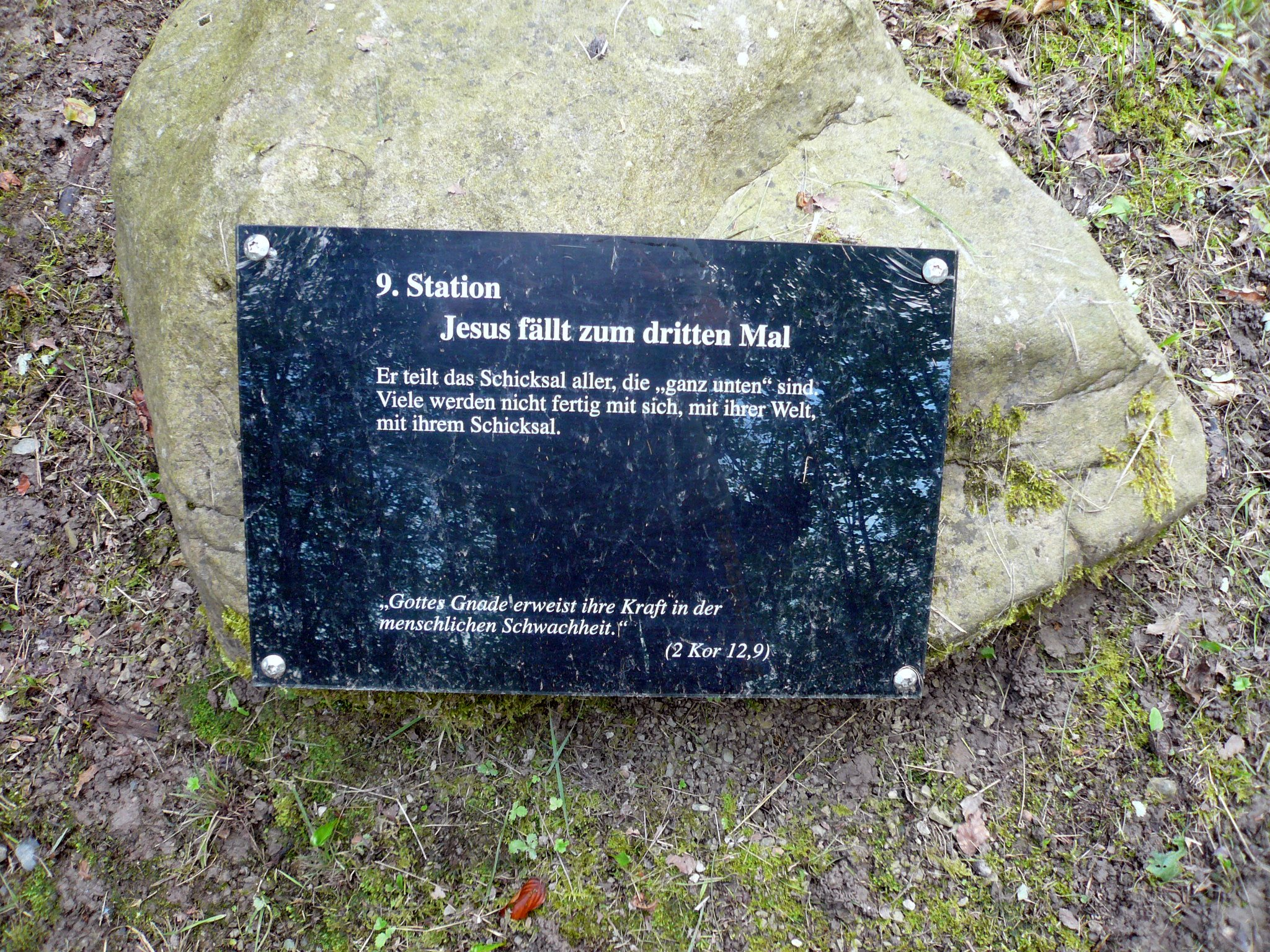 Kapellenkreuzweg Kloster Altstadt, Station 9 - Inschriftentafel